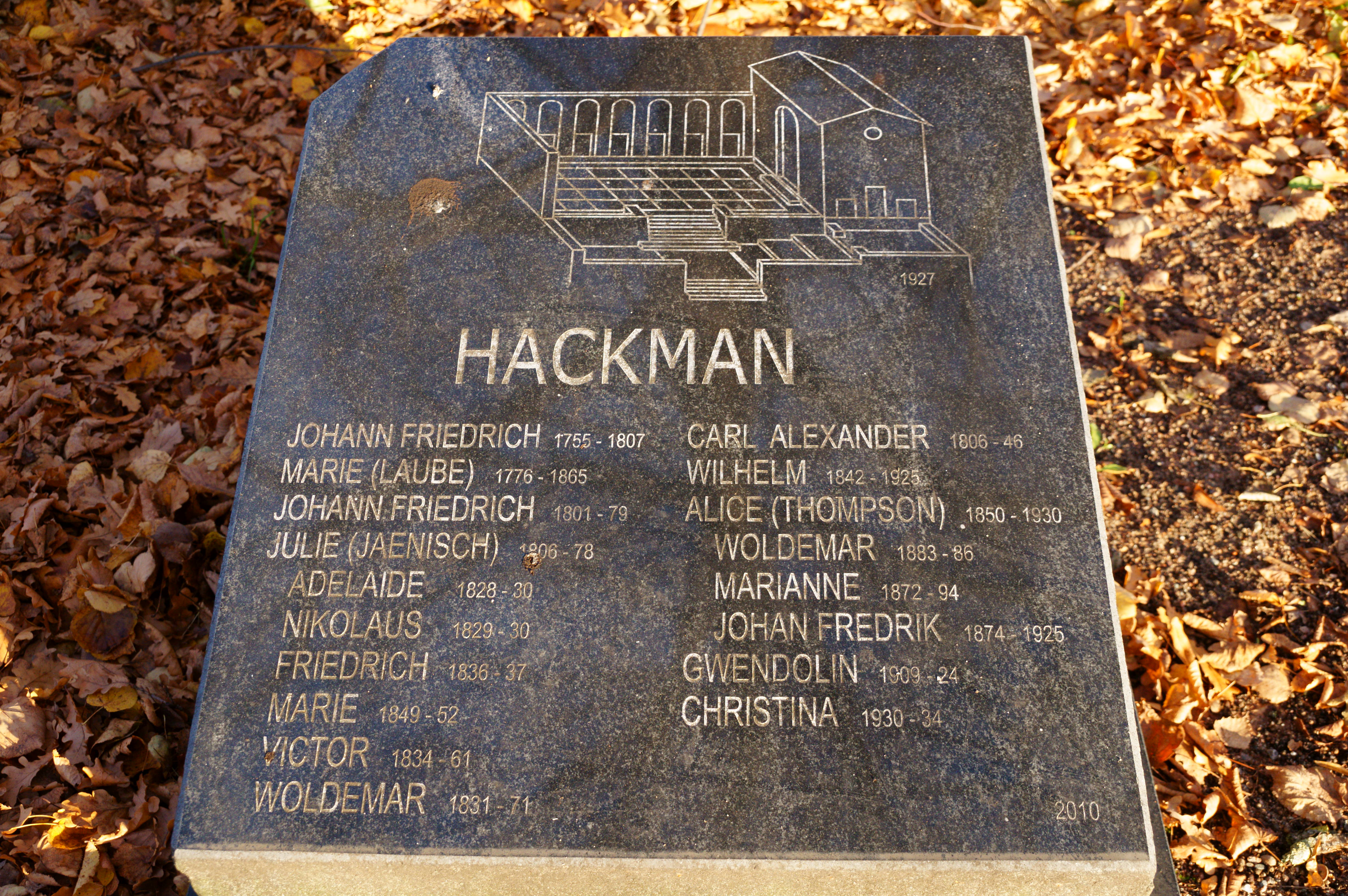 Сорвальское кладбище: пос. Гвардейский, улица Шестакова, Выборг, Выборгский район, Ленинградская область